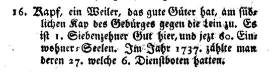 Beschreibung von Kapf (Alfdorf) durch Heinrich Prescher 1790